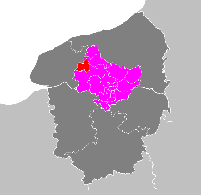 Maps of arrondissements and cantons of France: Arrondissement de Rouen - Canton d Yvetot.PNG